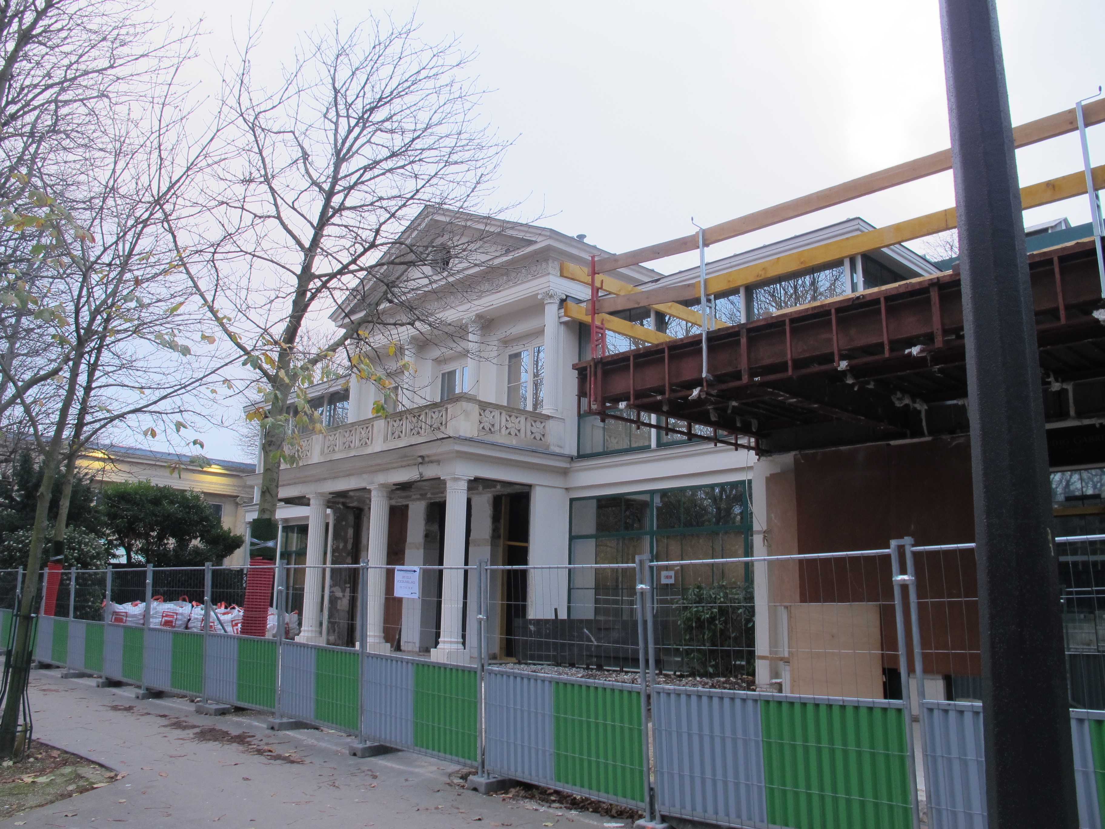 Pavillon Gabriel en travaux (décembre 2017), 9 avenue Gabriel (Paris, 8e).